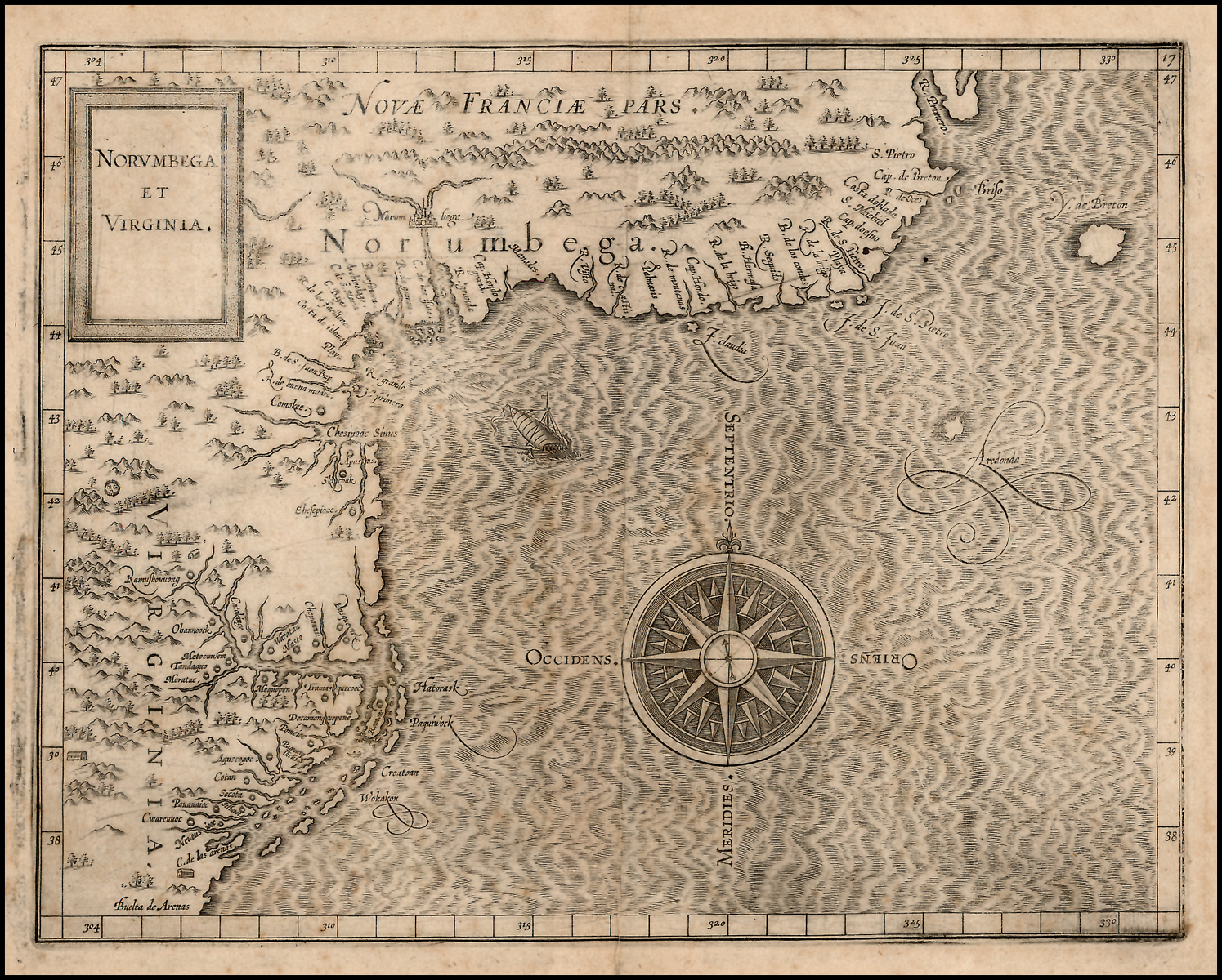 Carte marine et terrestre du cartographe Cornelius van Wytfliet réalisée entre 1597 et 1607.